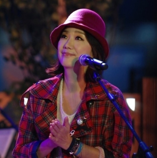 2014.9.28. 이상은 광화문 콘서트